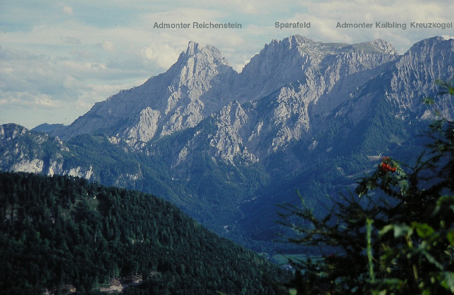 Blick vom Admonter Haus auf die Reichenstengruppe (Ennstaler Alpen)